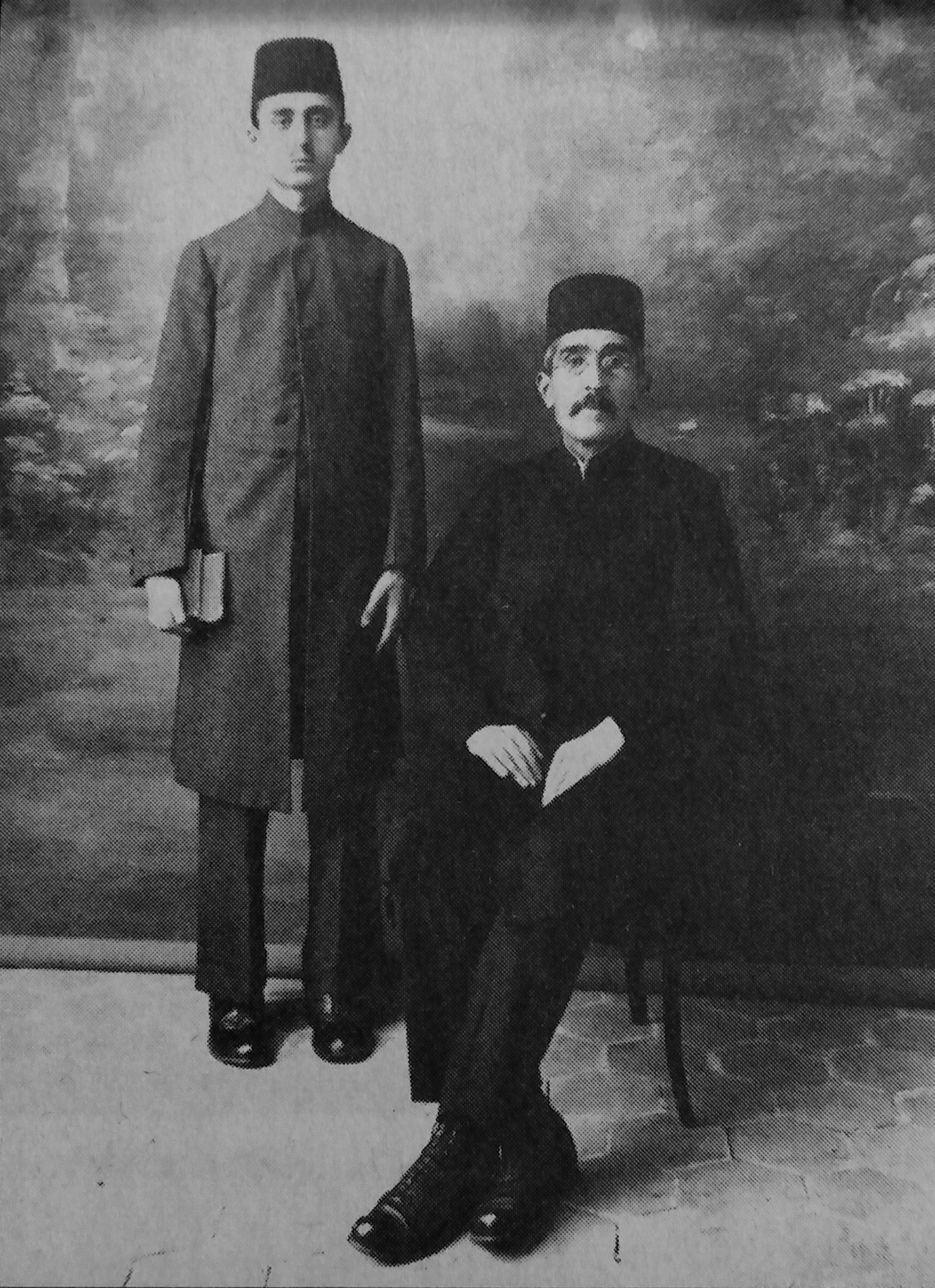 غلامحسین صدیقی و پدرش میرزا حسین خان صدیقی اعتضاد دفتر